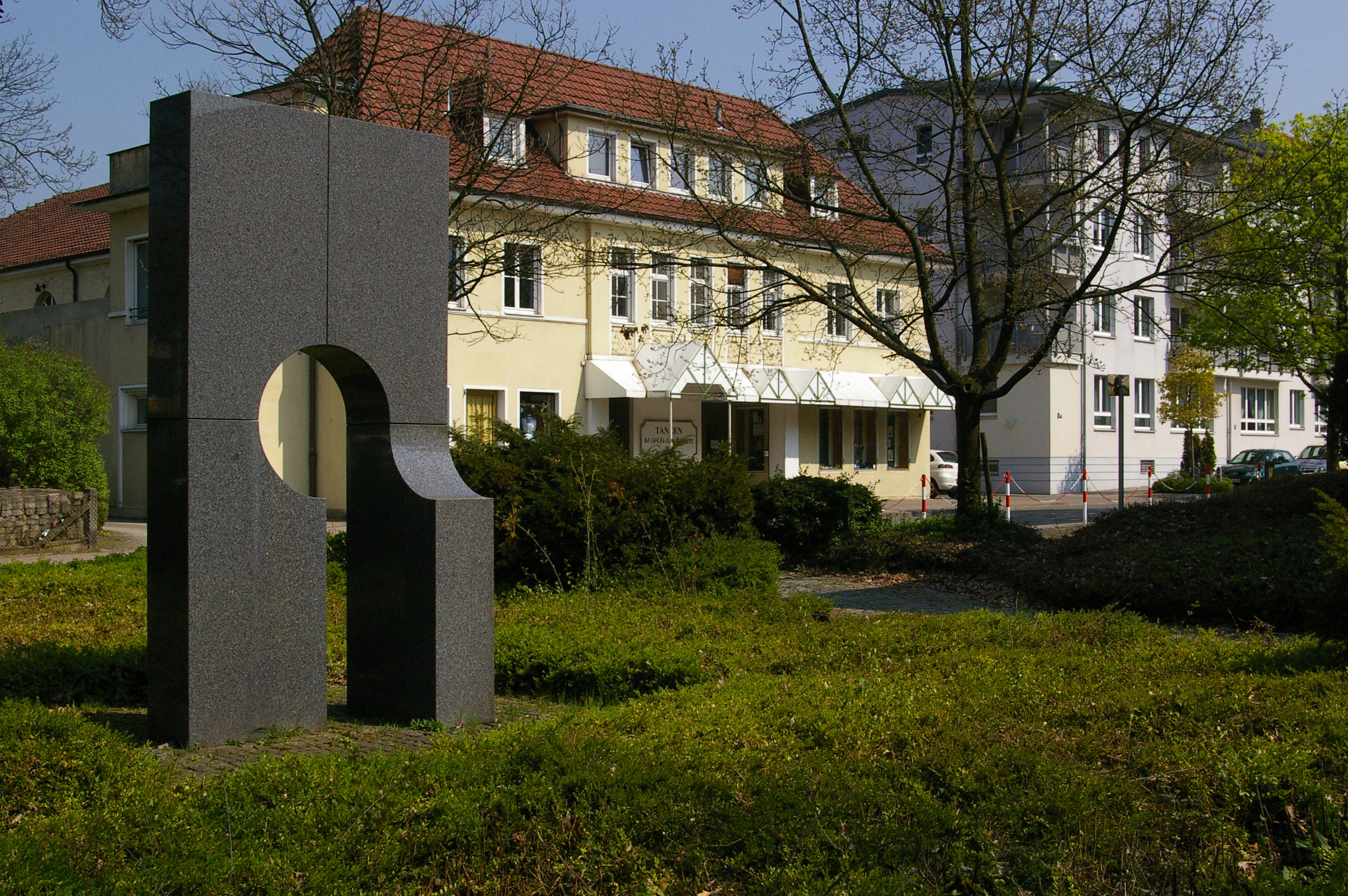 Grün Gold Haus in Herford